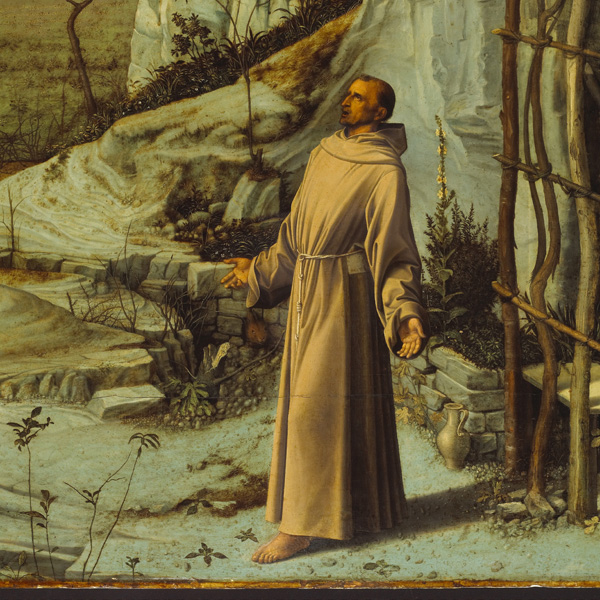 Giovanni bellini, san francesco